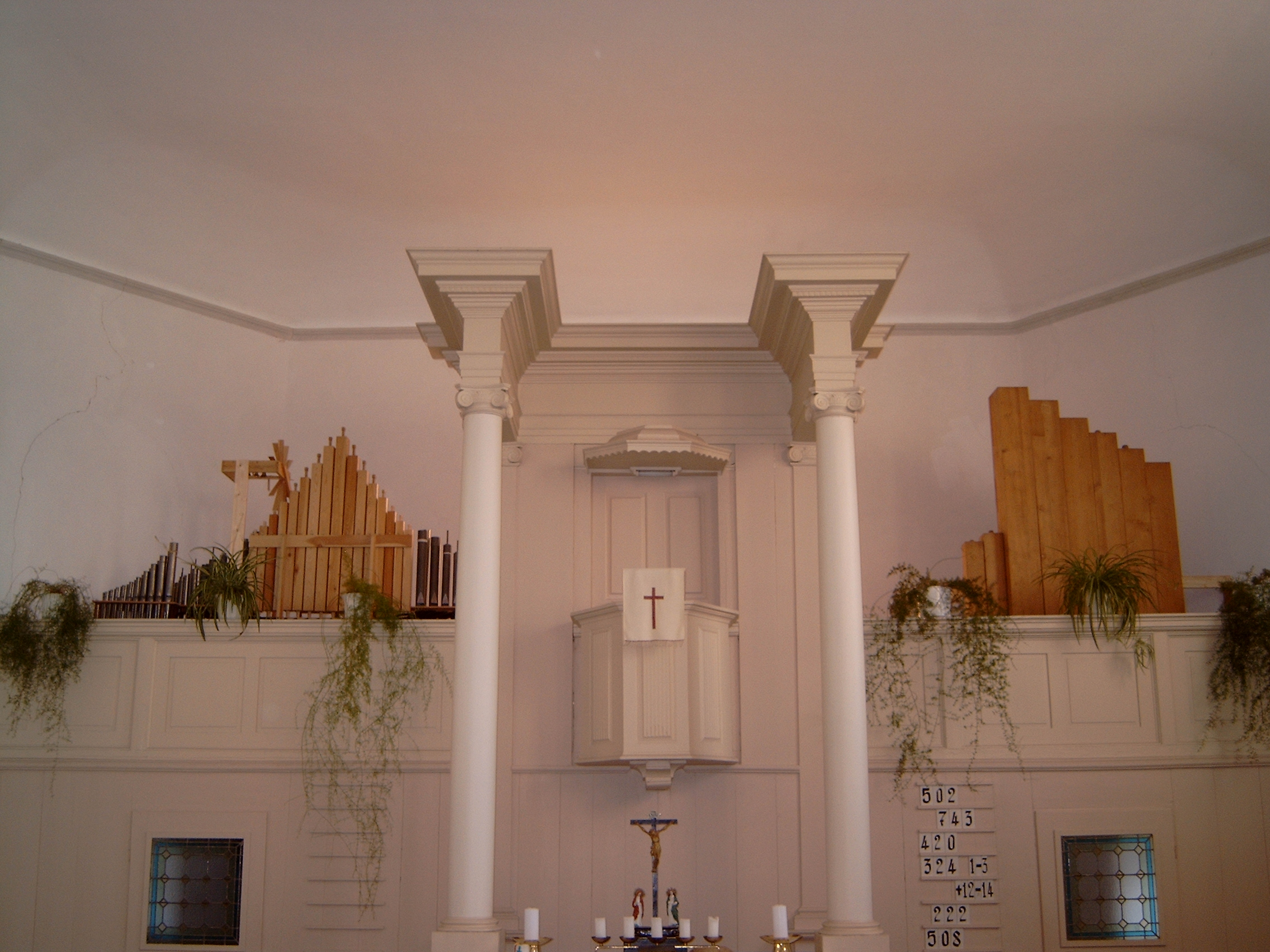 Ansicht Kanzelaltar und Orgel Laurentiuskirche Karsdorf/Unstrut